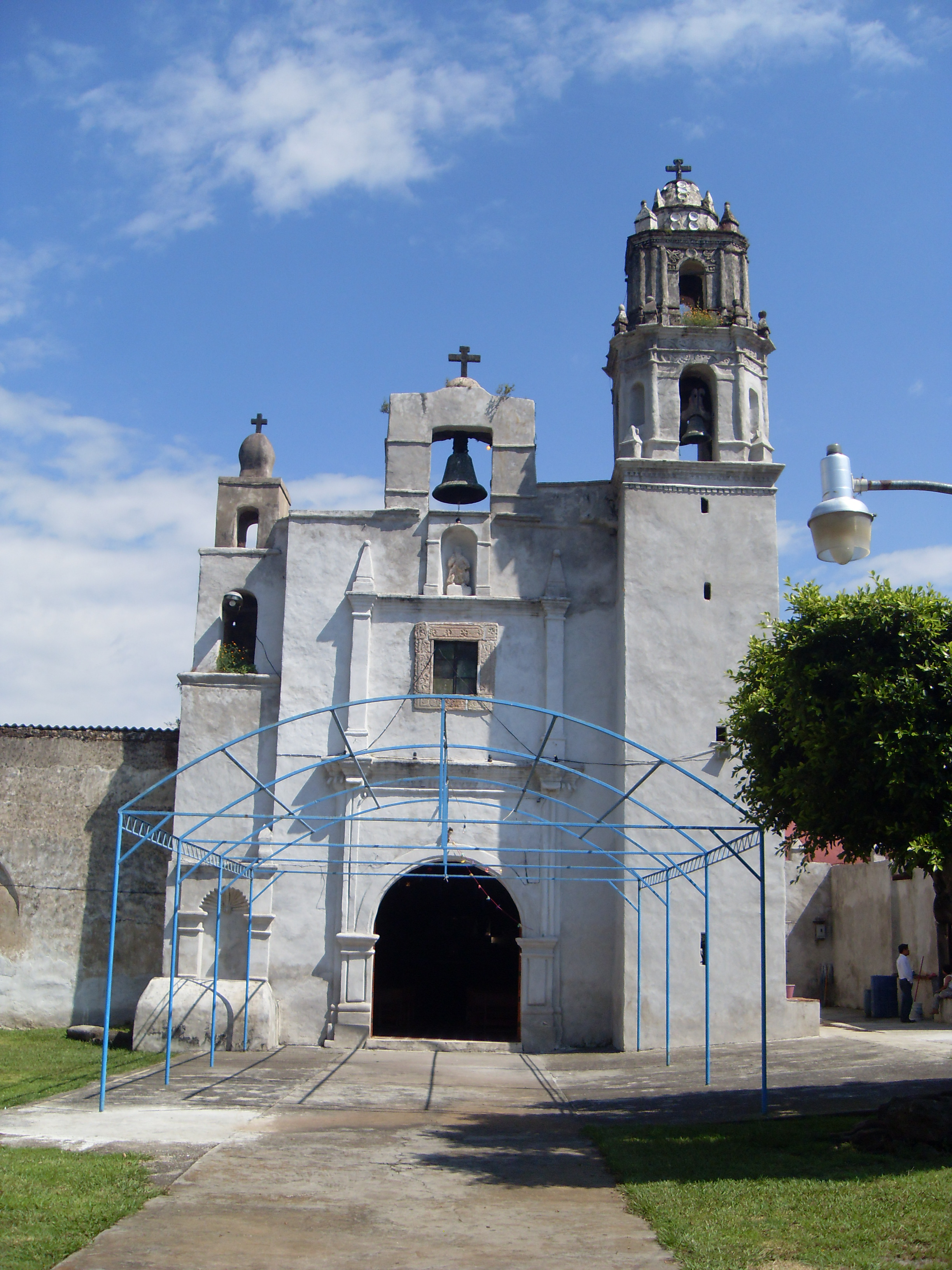 Fachada de la iglesia de San Andres de la Cal